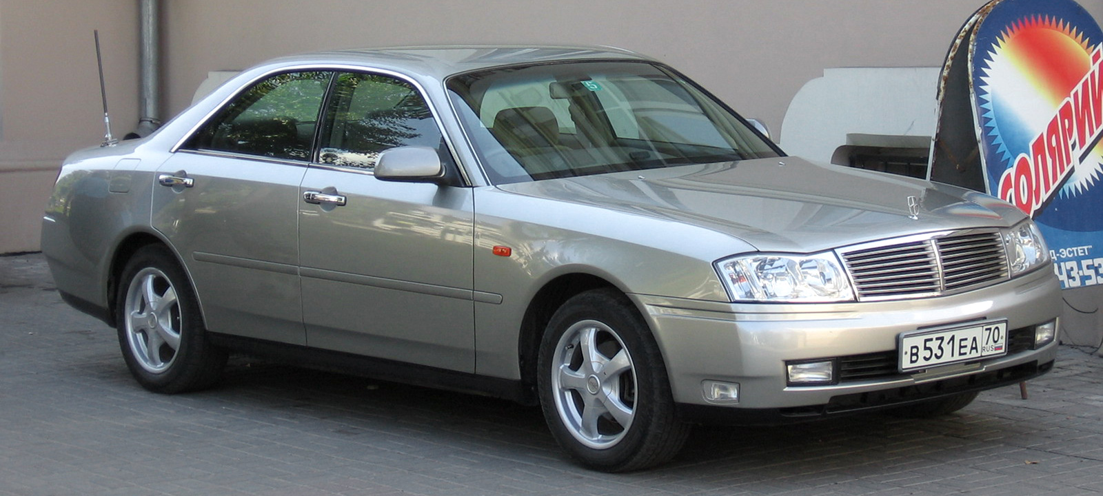 Photo taken in Tomsk, Russia